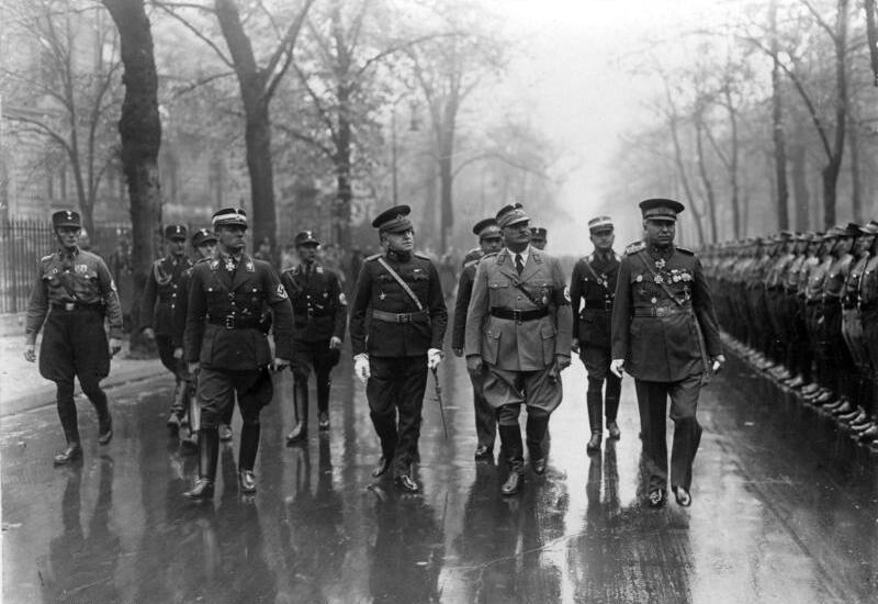 Die 10 Jahresfeier der türkischen Republik in Berlin. Der türische Botschafter in Berlin Kemaleddin Sami Pascha (rechts) schreitet mit dem Stabschef der S.A. Röhm, die Front ab.